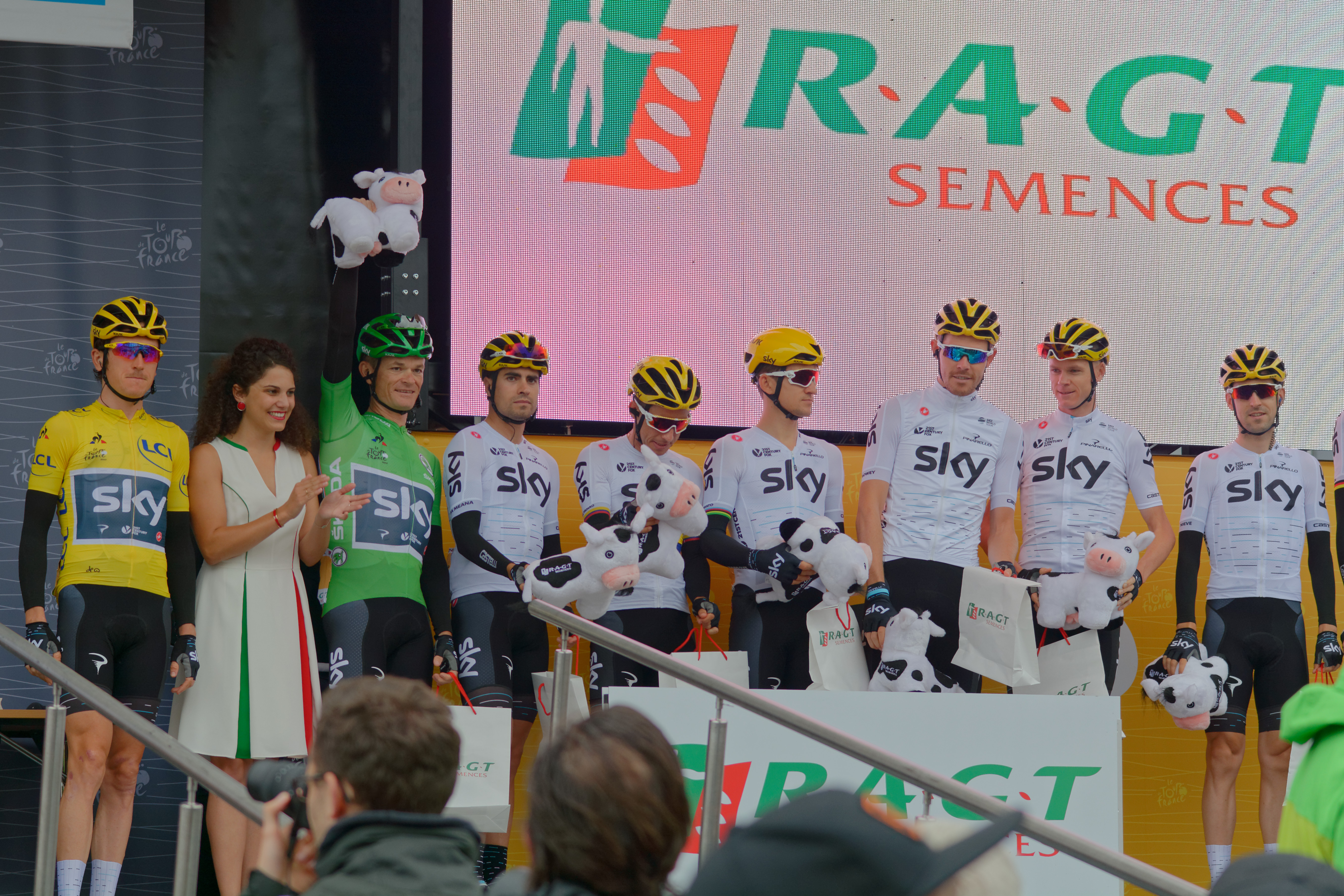 Tour de France 2017 Stage 2 Düsseldorf